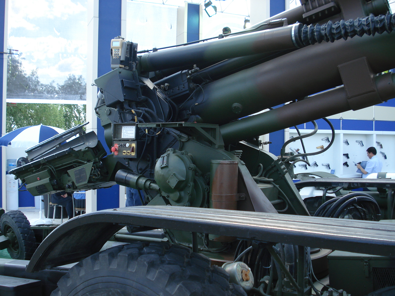 IDEF '07 Savunma Fuarı'nda çekildi.Panter obüs sistemi. 23 Mayıs 2007